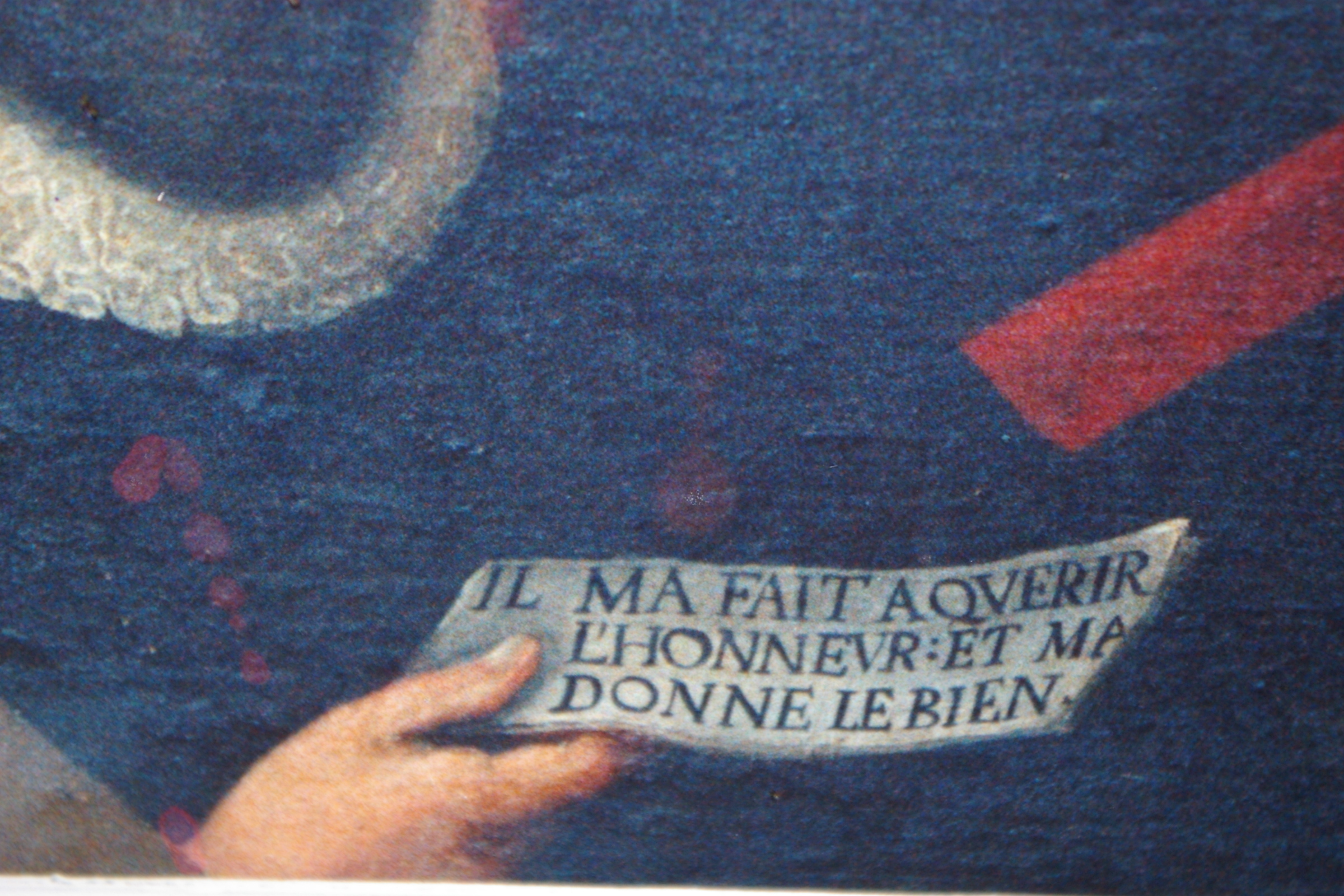 gros-plan sur la photo d'un portrait de Fouquet, musée de l'auditoire, Ste-Suzanne (Mayenne - france)